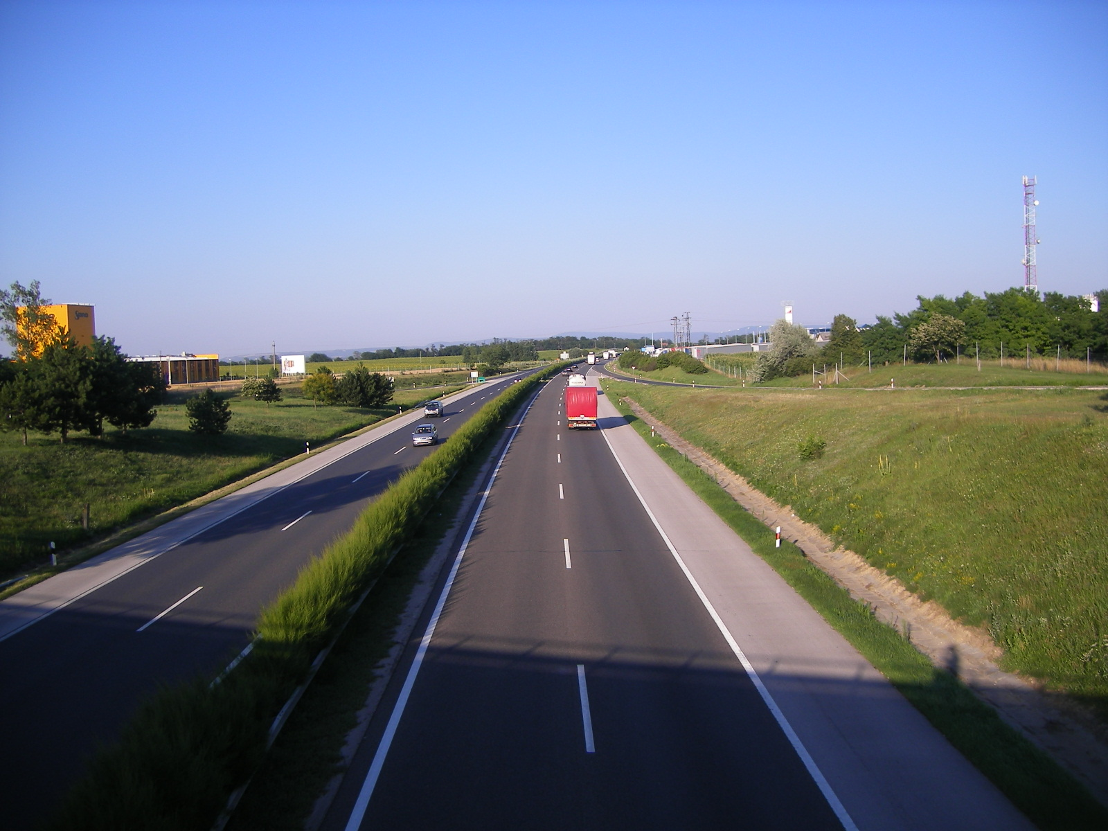 Az M1-es autópálya a 13-as út kereszteződésénél (kilátás kelet felé, az autópályától északra Csém, délre Kisigmánd községek területe)